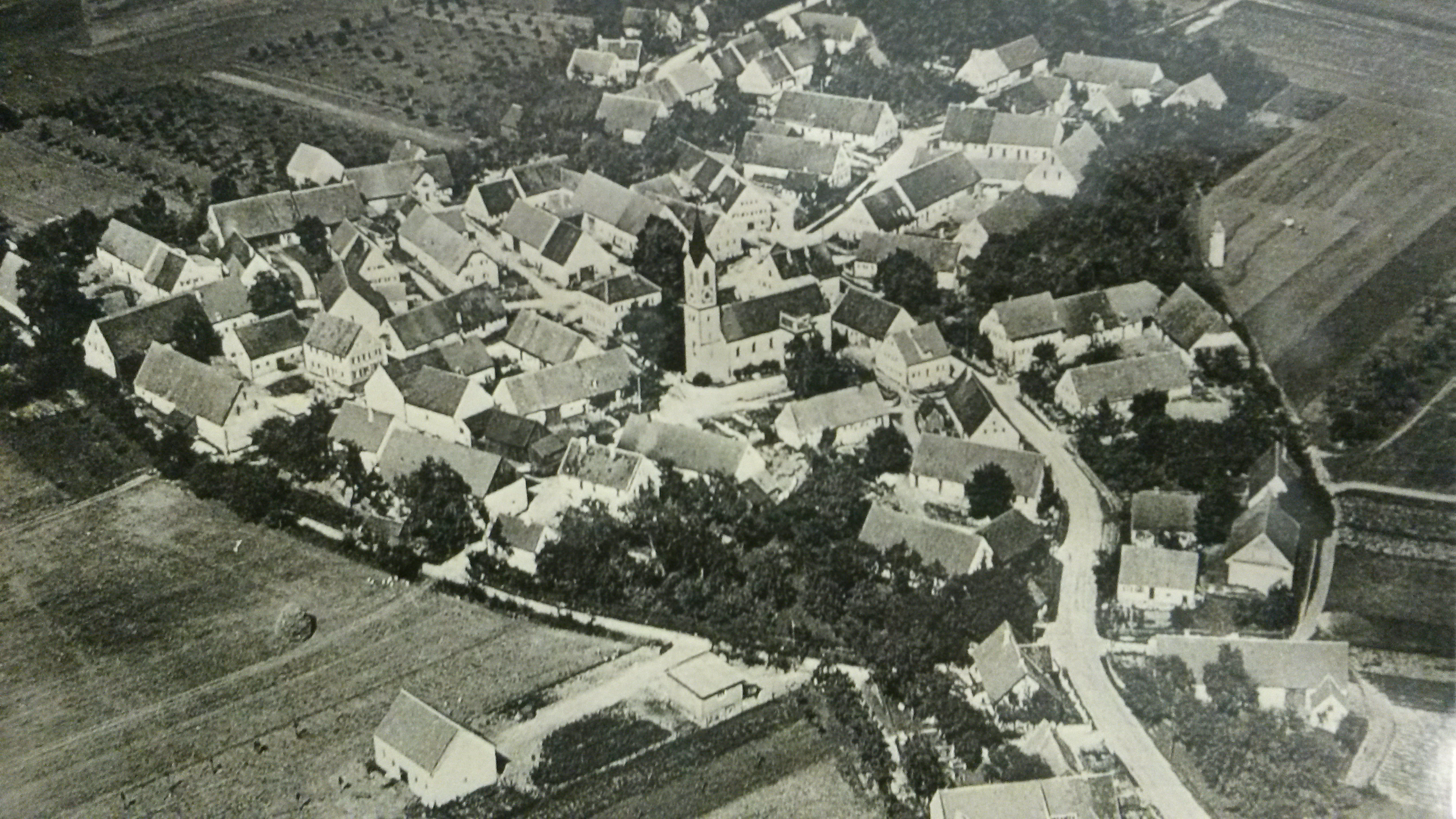 altes Luftbild von Reistingen um ca. 1918